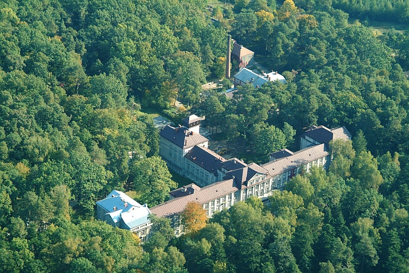 Zdjęcie lotnicze SSZZOZ w Rudce